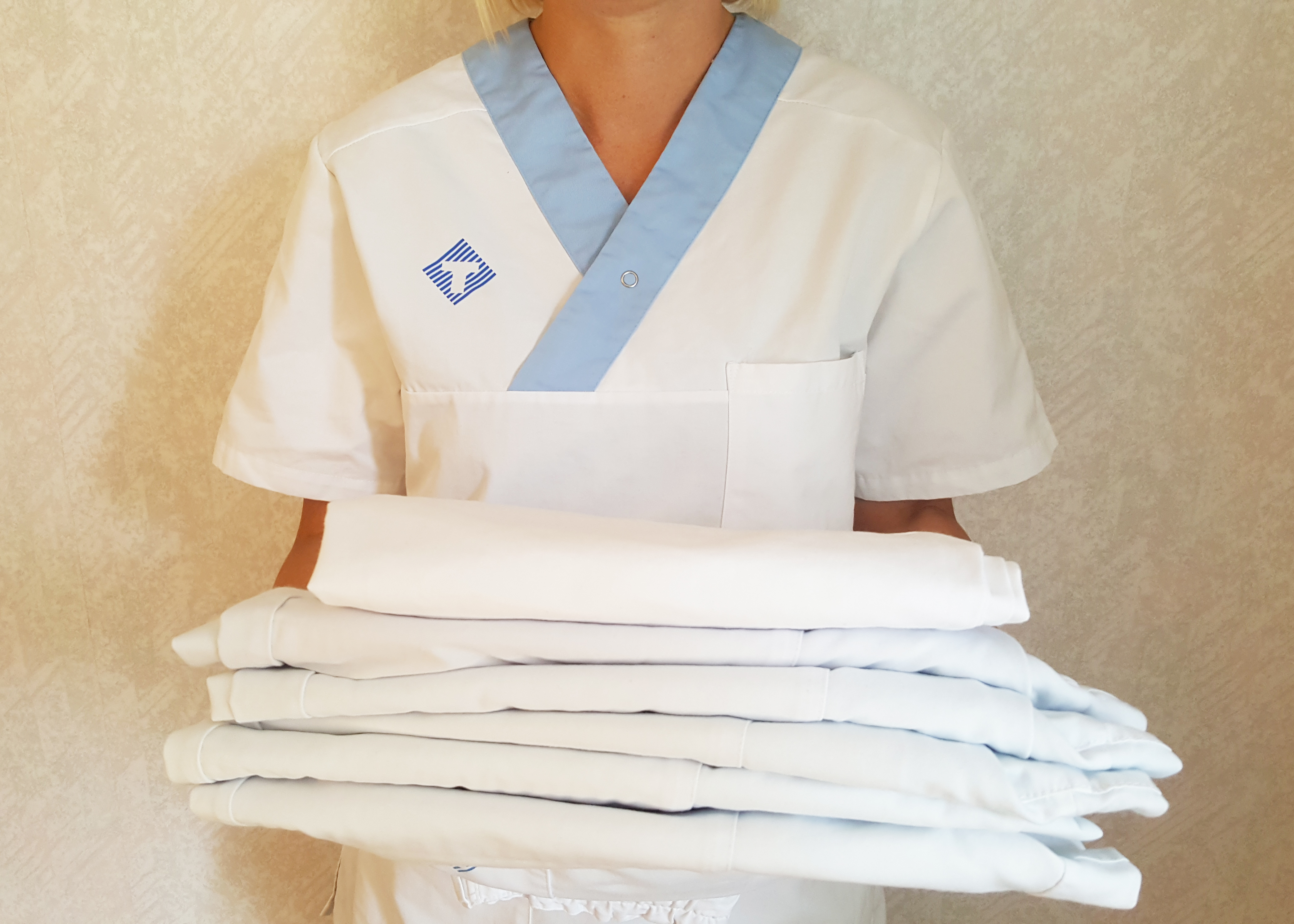 Skellefteå lasarett - vård och hälsa